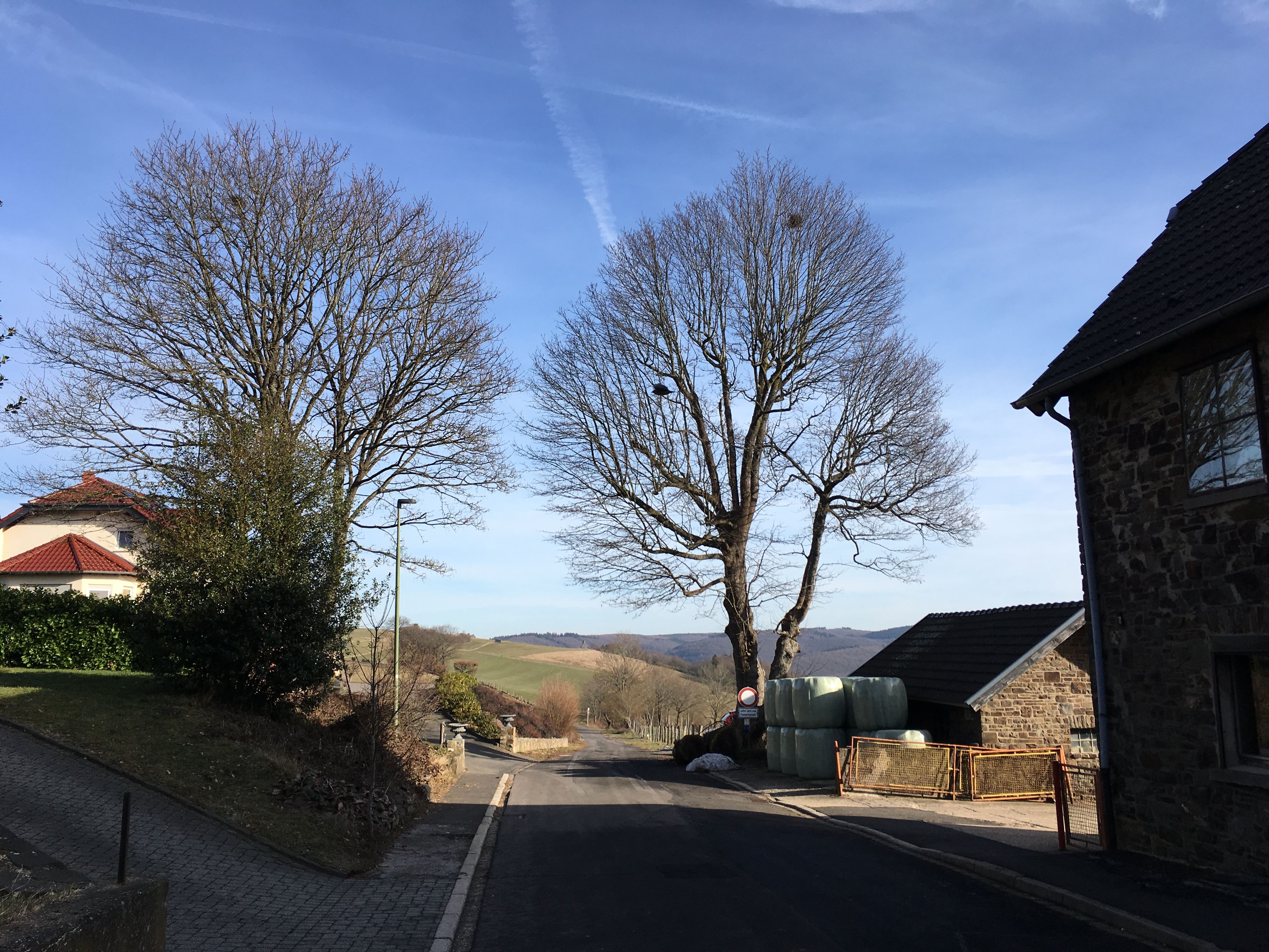 Morsbach, ein Stadtteil von Schleiden im Kreis Euskirchen in NRW